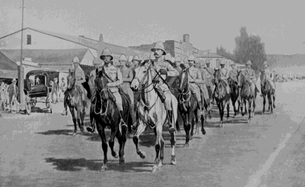 Entrata del feldmaresciallo Roberts e del generale Kitchener a Pretoria